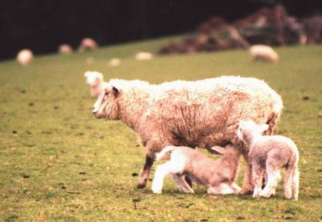 羔羊跪乳。2002年Eternal攝于Southland, New Zealand.